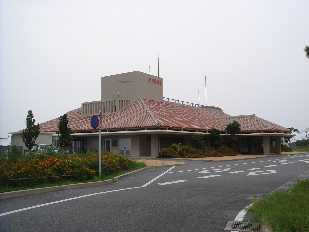 多良間空港ターミナル外観(沖縄県宮古郡多良間村)